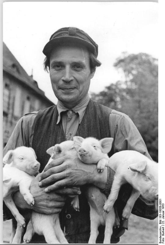 Zentralbild-Burkert Zi-Wi. 22.1.1953 Schweinezuchtmeister Blankartz will 1953 1000 Schweine bis zur Schlachtreife mästen. Der Schweinezuchtmeister des Volkseigenen Gutes Schöngleins, Leonhardt Blankartz, verpflichtete sich, 1953 1000 Schweine bis zur Schlachtreife zu mästen. In enger Zusammenarbeit mit dem bekannten Tierzuchtforscher Professor Dr. W. Stahl von der Humboldt-Universität Berlin und durch Anwendung sowjetischer Erfahrungen, steigerte Kollege Blankartz die tägliche Gewichtszunahme eines Masttieres von 300 auf 1200 Gramm. UBz, Kollege Blankartz.